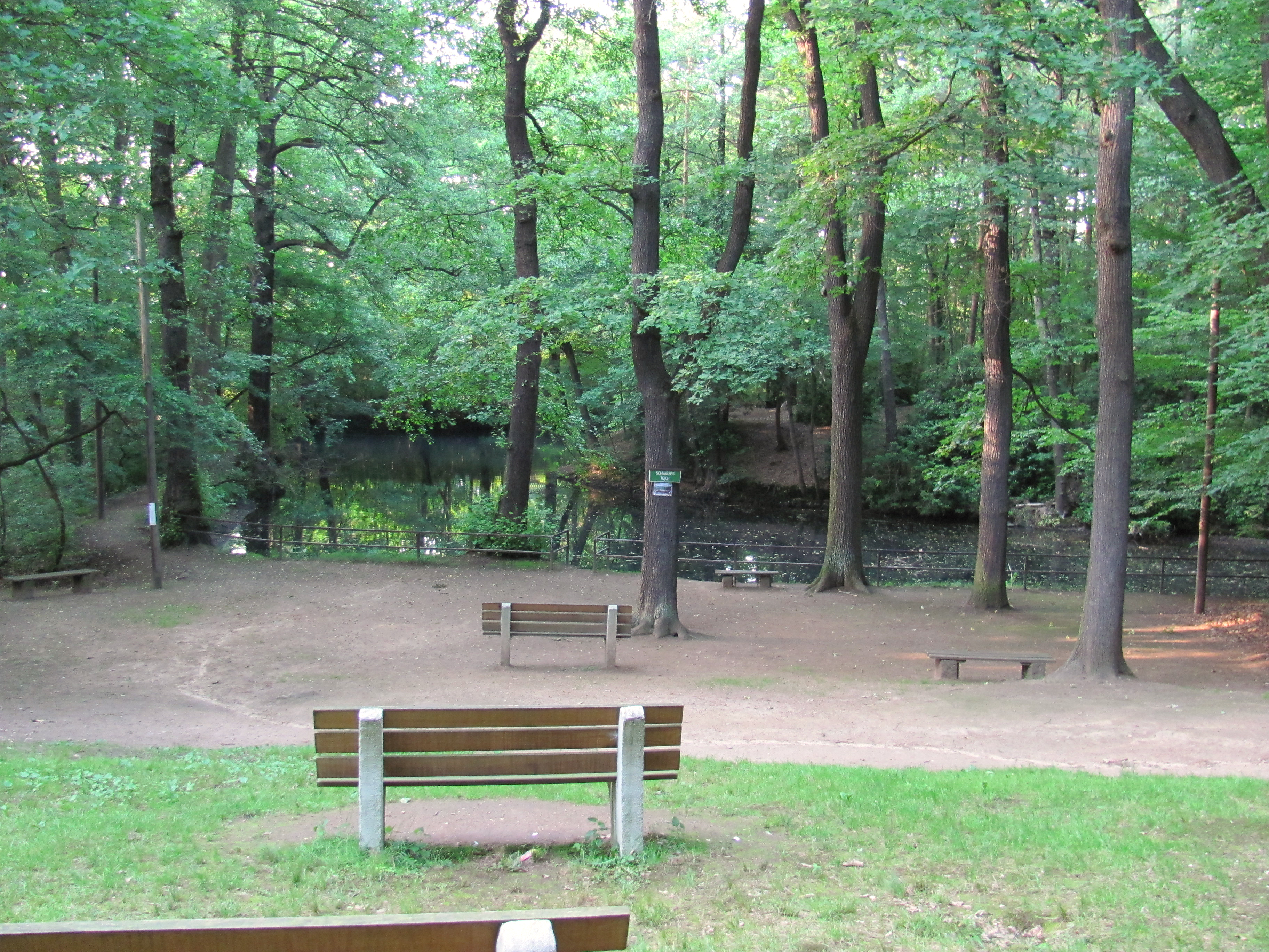 Radebeul, Konzertplatz auf der Parkseite von Schwarzes Teich